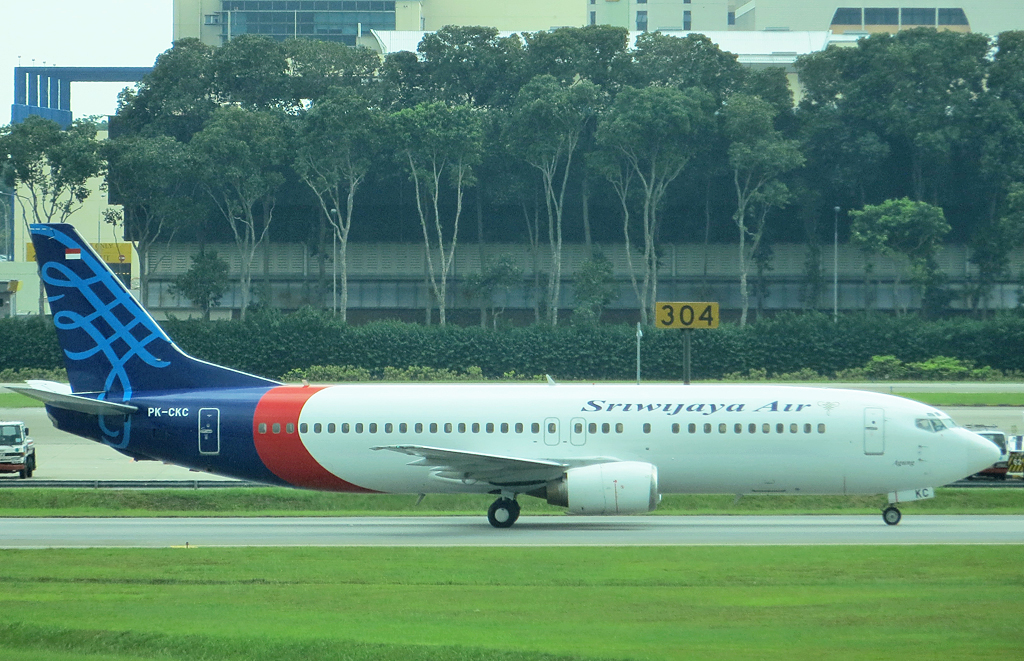 PK-CKC B737-4Q8 Sriwijaya Air at Singapore Changi on October 19, 2012.